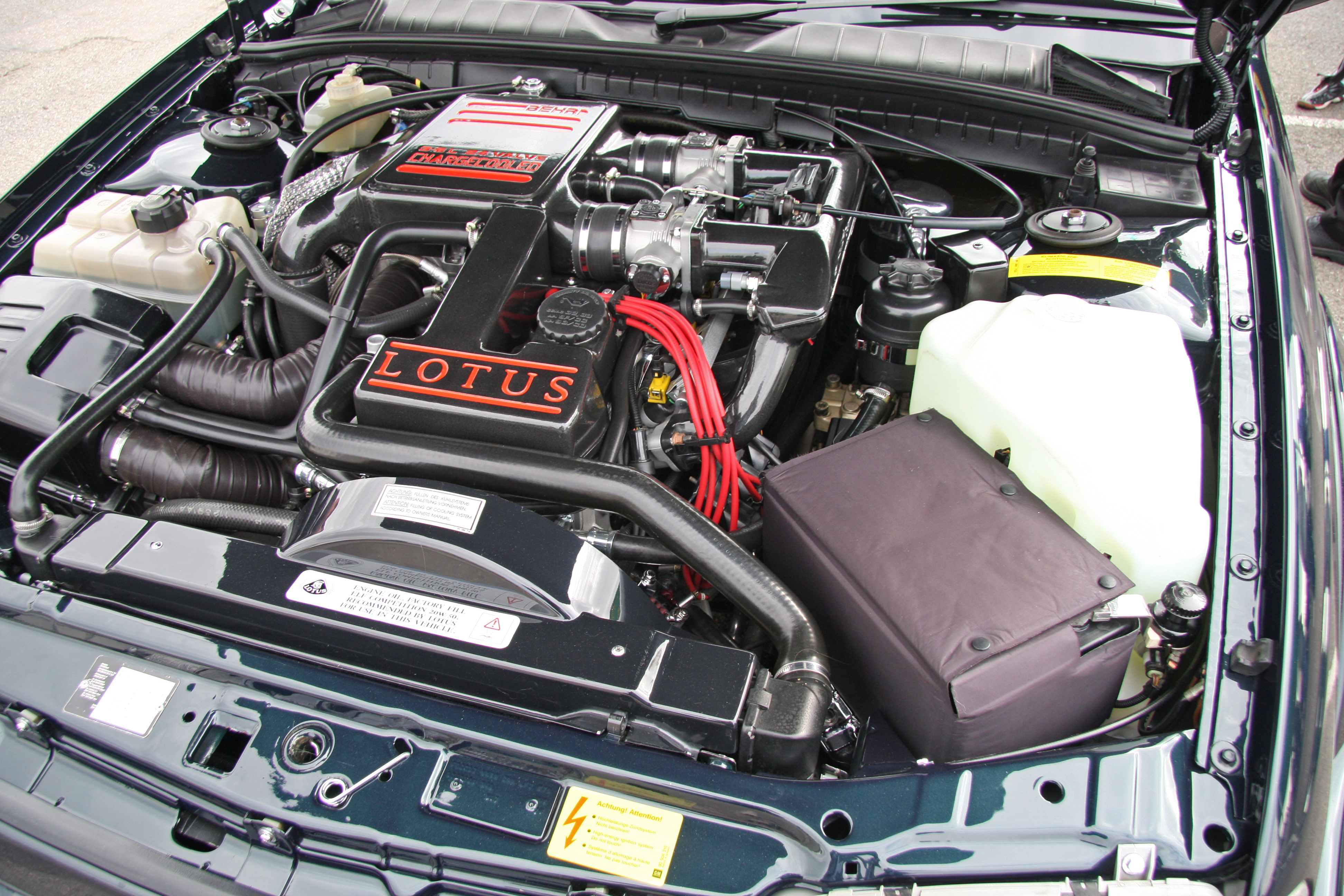 Lotus 60th Celebration Lotus Carlton/Lotus Omega (1990-93) cylindrée - displacement: L6 3 615 cc, 2 turbos Garrett T25 + Behr intercooler puissance - max. power output: 281 kW @ 5 200 rpm couple maxi - torque: 560 Nm @ 4 200 rpm transmission - gearbox: ZF man. 6 Lxl: 4,69x1,93 m pneus - tires: 235/45 ZR 17, 265/40 ZR 17 (R) réservoir - fuel tank: 75 l vol. coffre - trunk: 520 l poids - tare: 1 650 kg V max. - top speed: 285 km/h